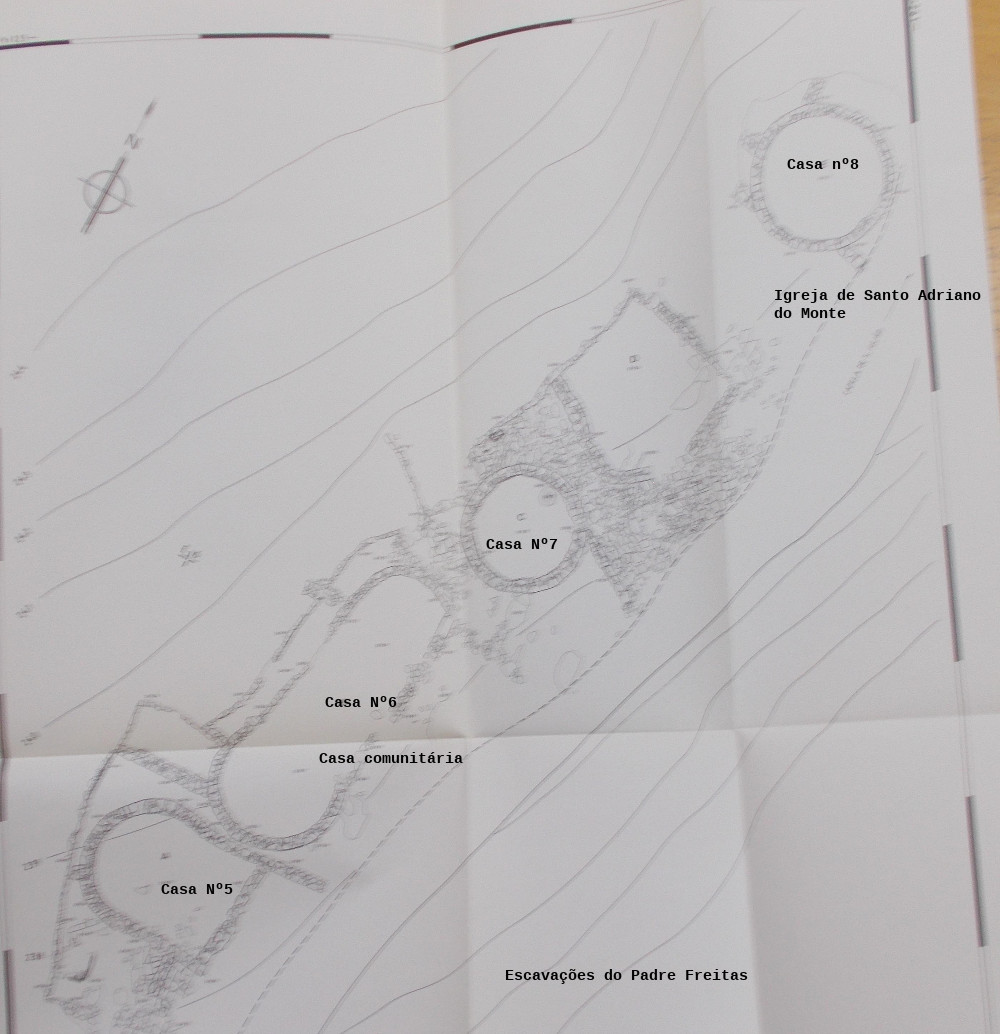 Planta das escavações do Padre João Freitas na Citânia de São Julião, Ponte São Vicente, Vila Verde, Portugal. Com localização da Igreja de Santo Adriano (antiga paróquia de Santo Adriano do Monte). Alteração duma planta da Doutoura Manuela Martins.